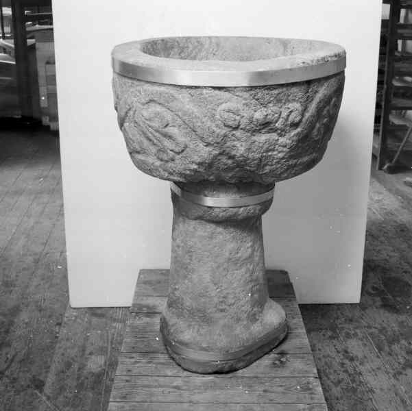 Dopfunt, av glimmergnejs, 1200-tal, svårt skadad i branden, numera i nya kyrkan. Efter konservering. Kategori: (04) DopfuntarDopfunt, av glimmergnejs, 1200-tal, svårt skadad i branden, numera i nya kyrkan. Efter konservering.